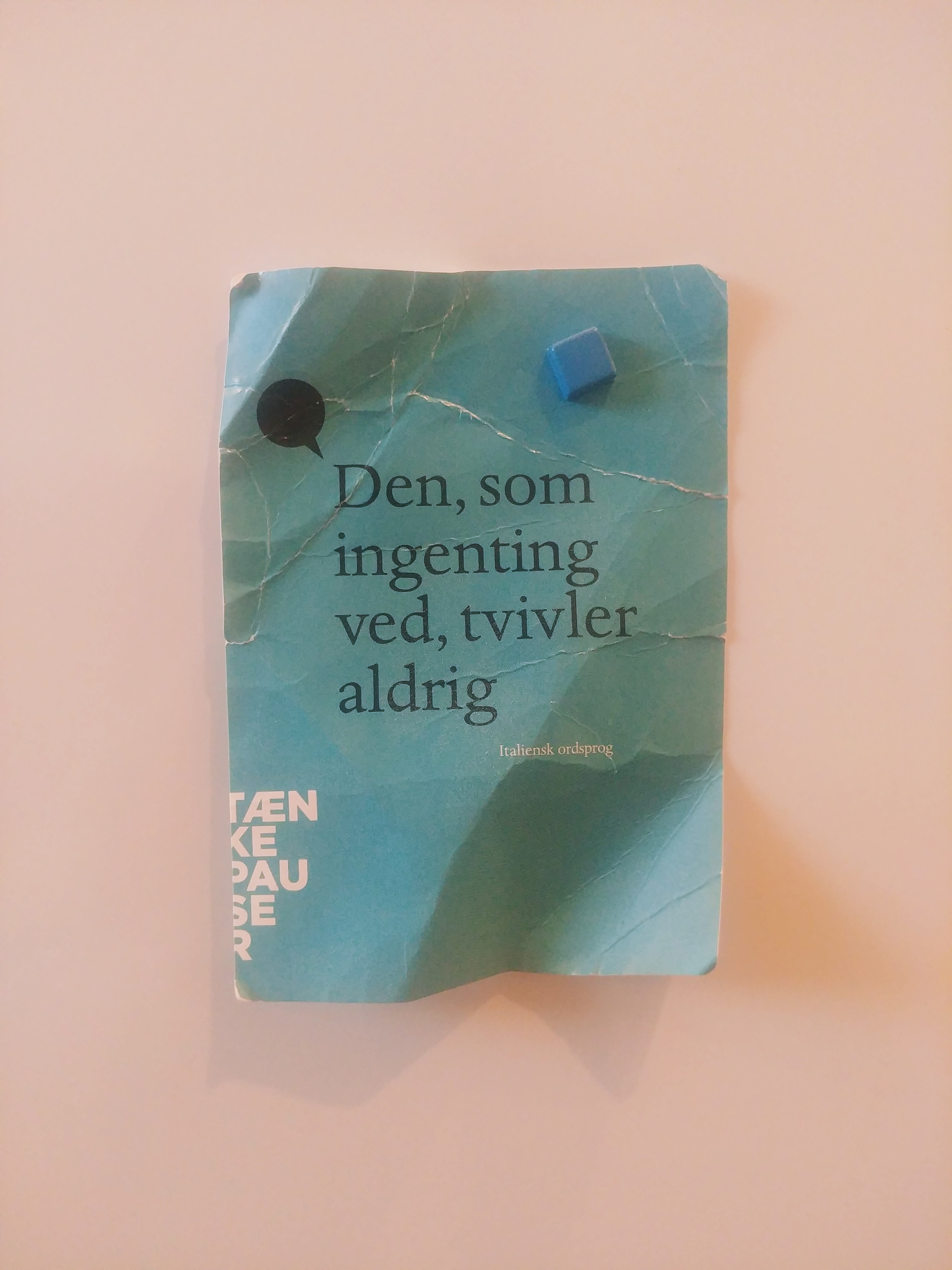 Italiensk ordsprog på postkort